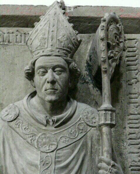 Darstellung des Fürstbischofs Gerhard von Schwarzburg auf seinem Epitaph im Würzburger Dom